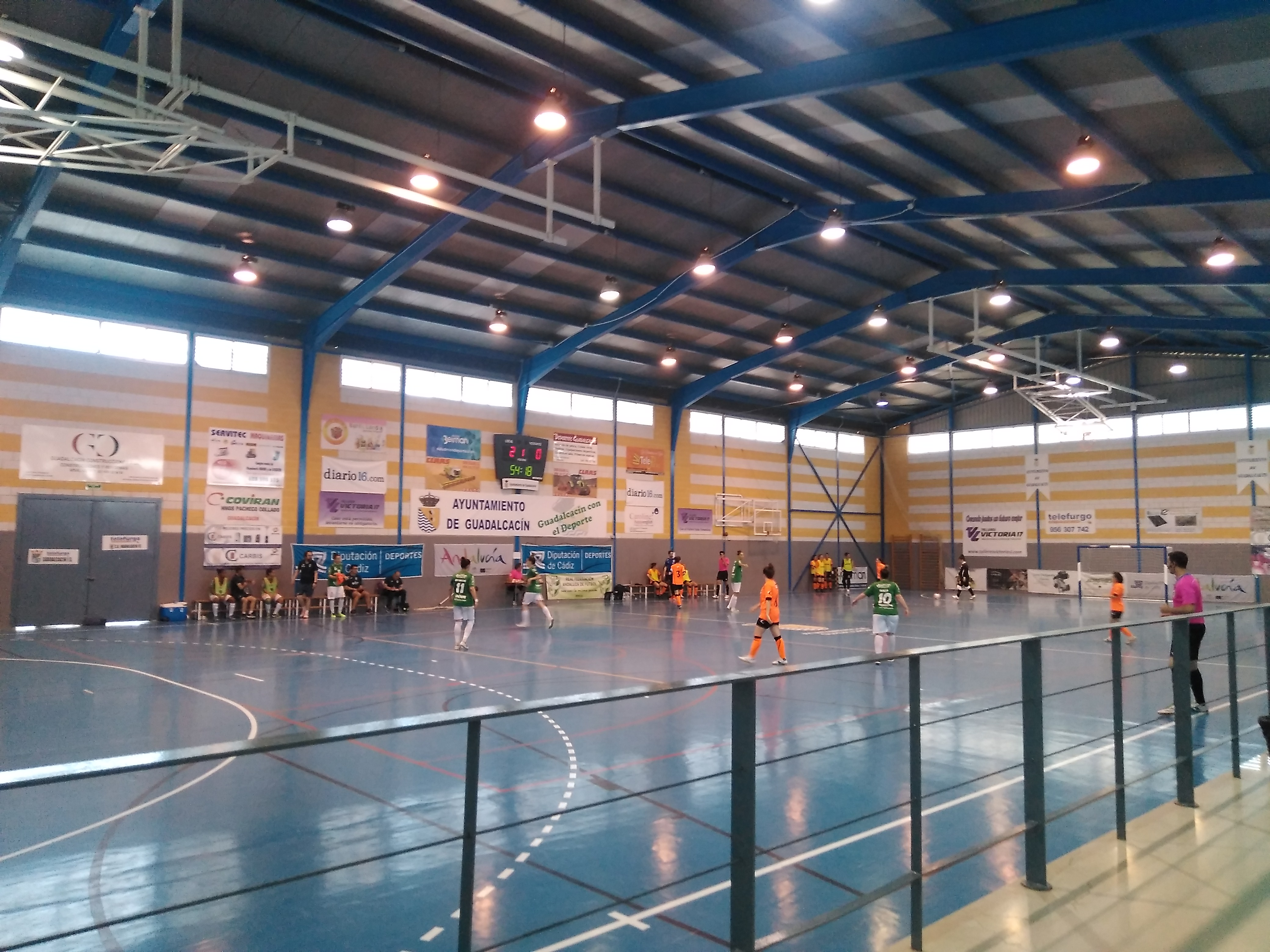 Partido de la Primera División de fútbol sala femenino en España 2019/2020 entre Guadalcacín FS CD - Viaxes Amarelle FS 2019